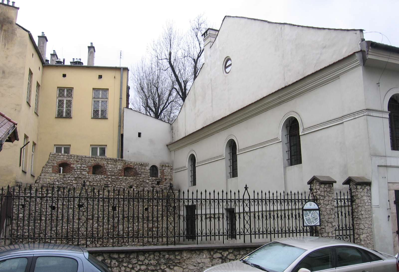 Synagoga Kupa w Krakowie Author: Wikipedysta:Birczanin